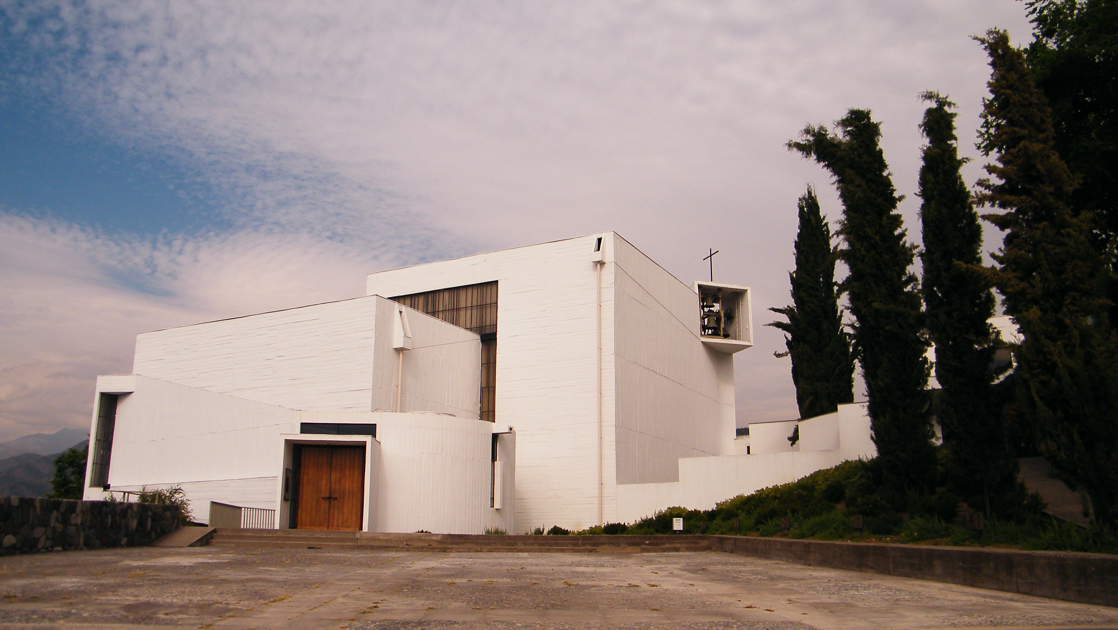 Fachada del monasterio This is a photo of a national monument in Chile: 240